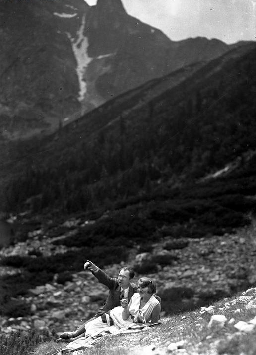 Józef Aleksander Gałuszka z żoną Edytą nad Morskim Okiem.